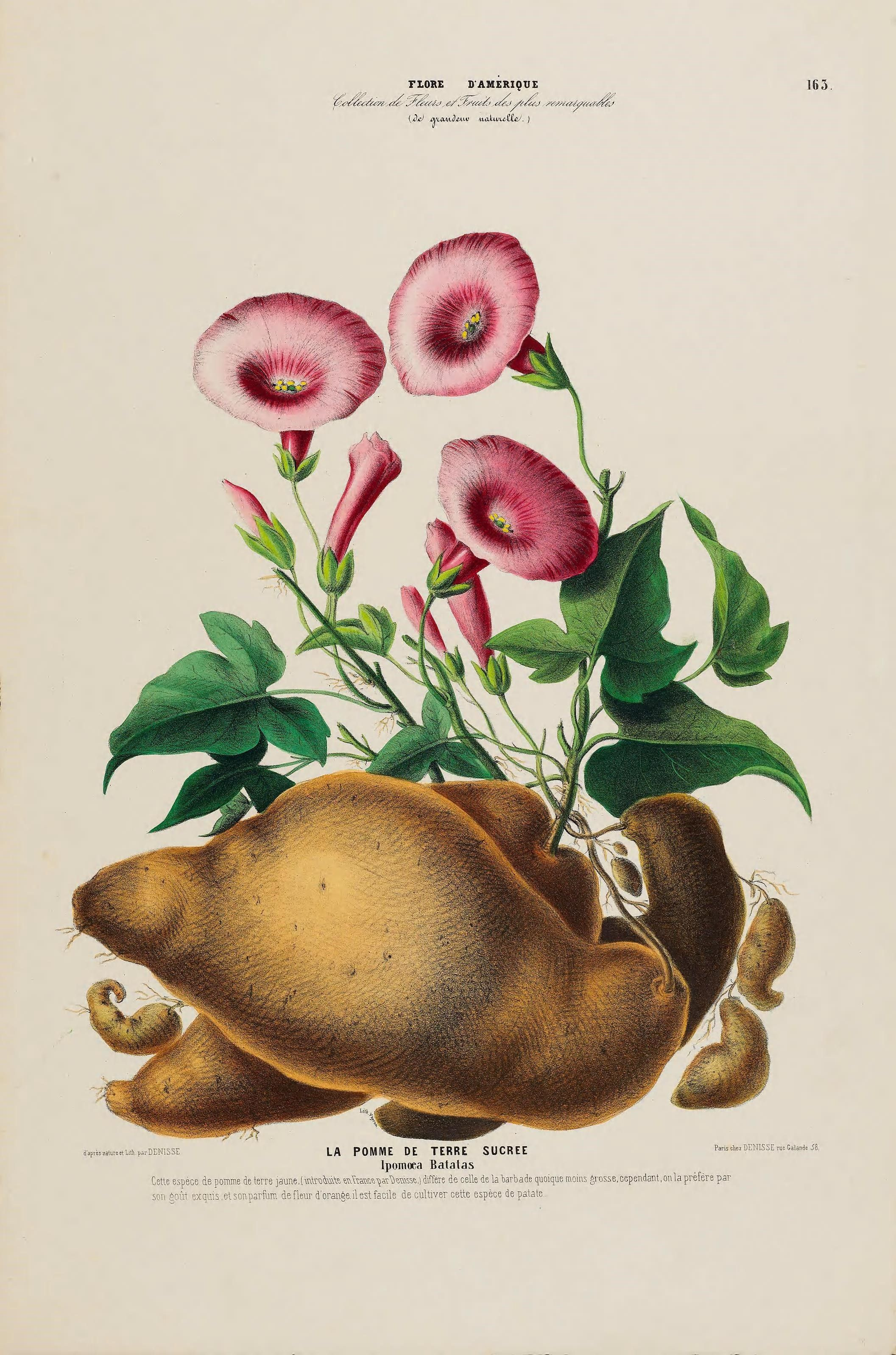 Pomme de terre sucrée (Ipomoea batatas), illustration botanique extraite de Flore d'Amérique, dessinée d'après nature sur les lieux. Riche collection de plantes les plus remarquables, fleurs & fruits de grosseur & de grandeur naturelle chez Gihaut Frères (Paris), 1843-1846